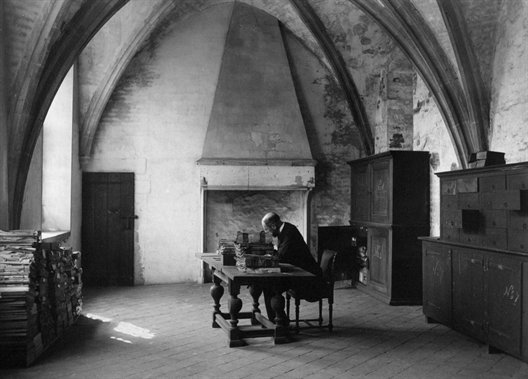 Samuel Muller Fz. gefotografeerd in 1901 door de beroepsfotograaf Ferdinand Reissig (overleden 1936) in de archiefkamer van de Utrechtse Domkerk